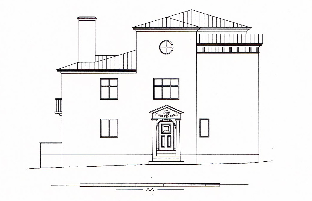 Jägarhyddan, ombyggnadsförslag, ej utfört